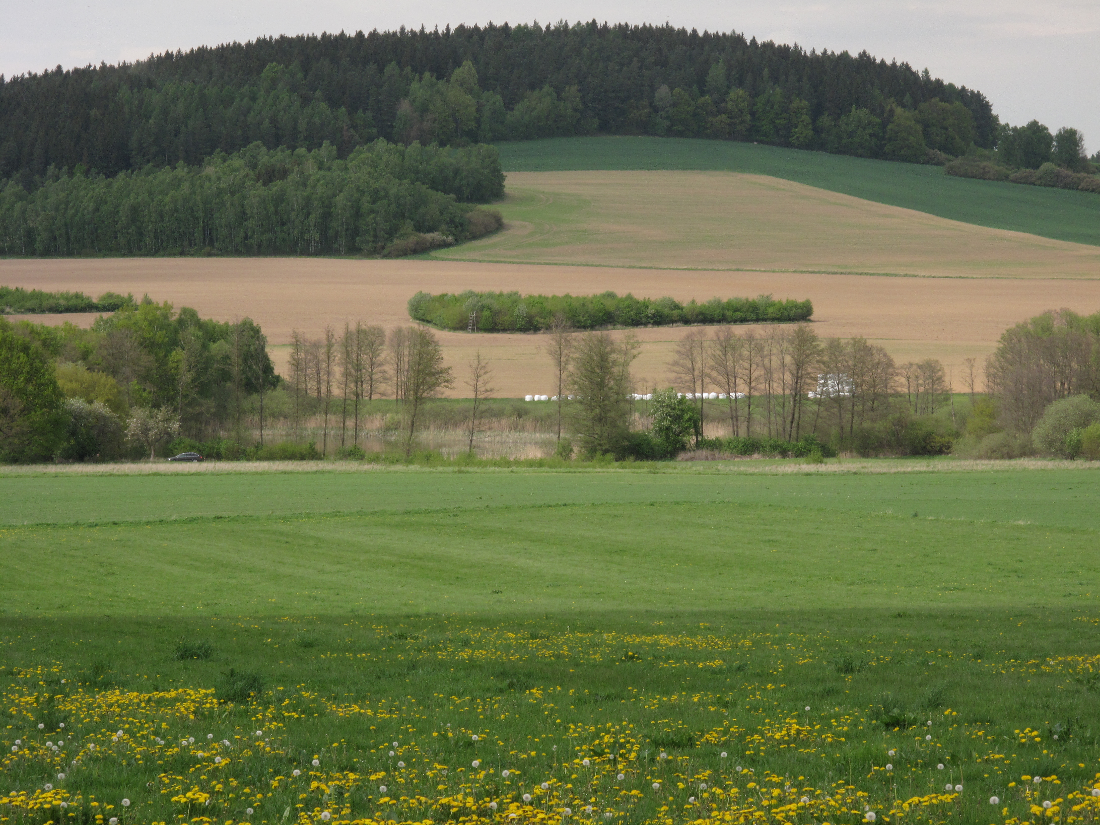 Přírodní památka Rybník Louňov. Okres Benešov, Česká republika.